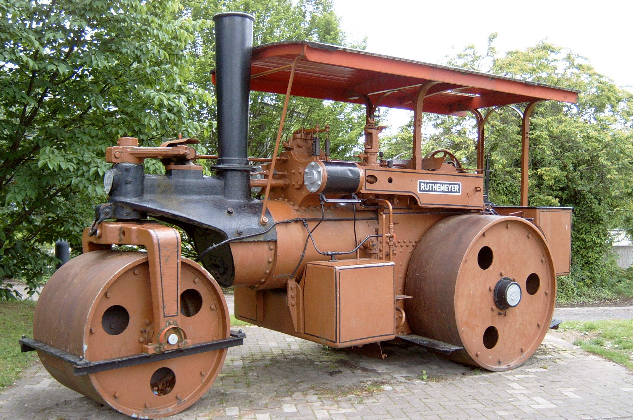 Soest, Westfalen, Industriegeschichte, Walzenfabrik Bernhard Ruthemeier, „Walzendenkmal“ am alten Werksstandort, heute Stadthalle